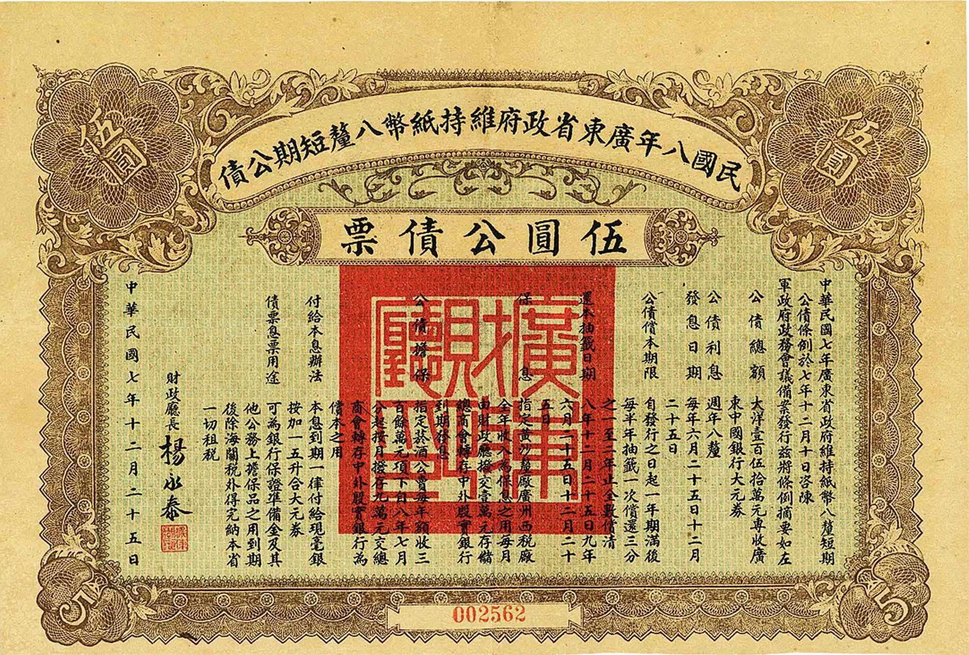 民国八年广东省政府维持纸币八厘短期公债伍圆公债票